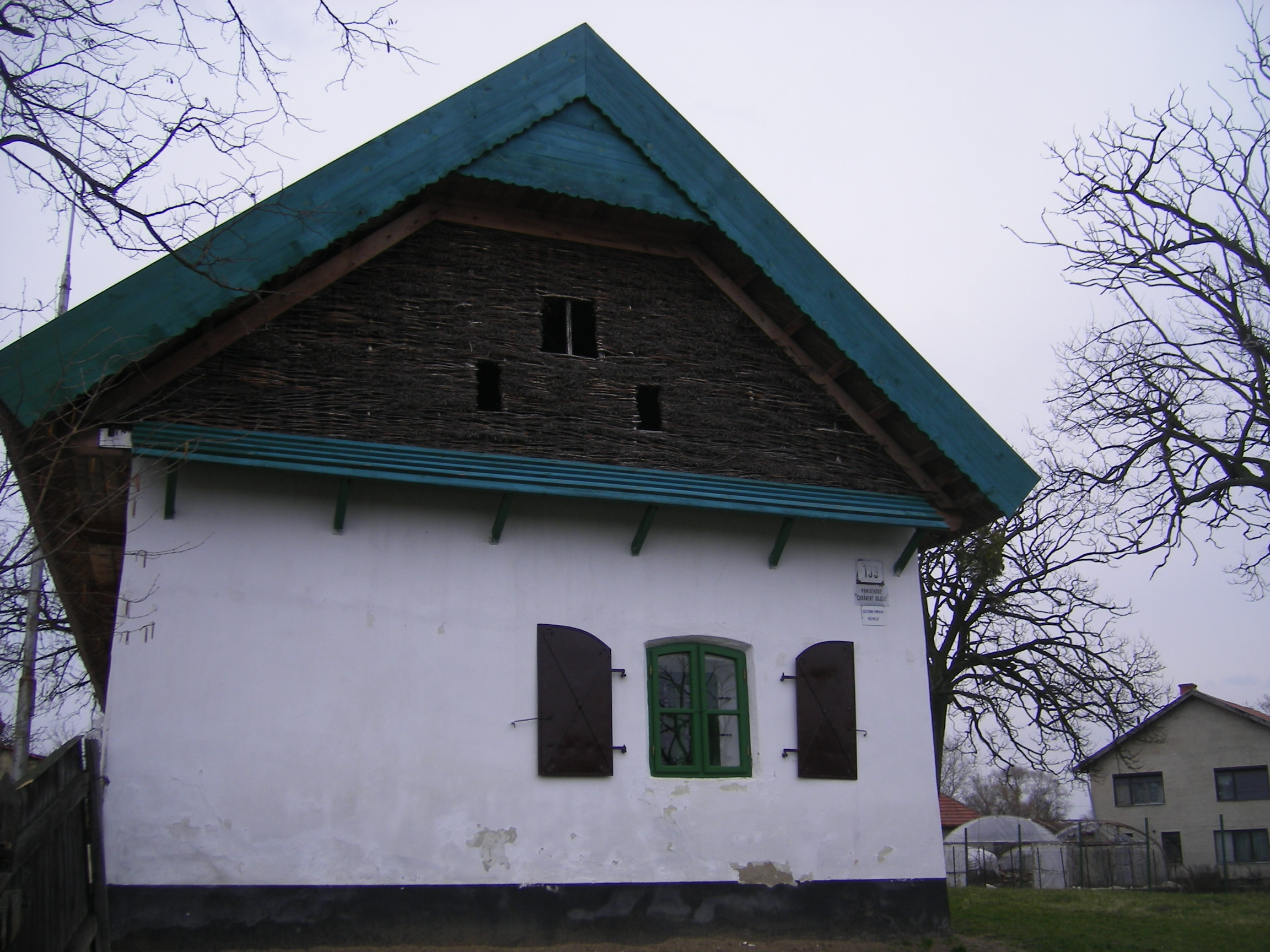 Martos, tájház